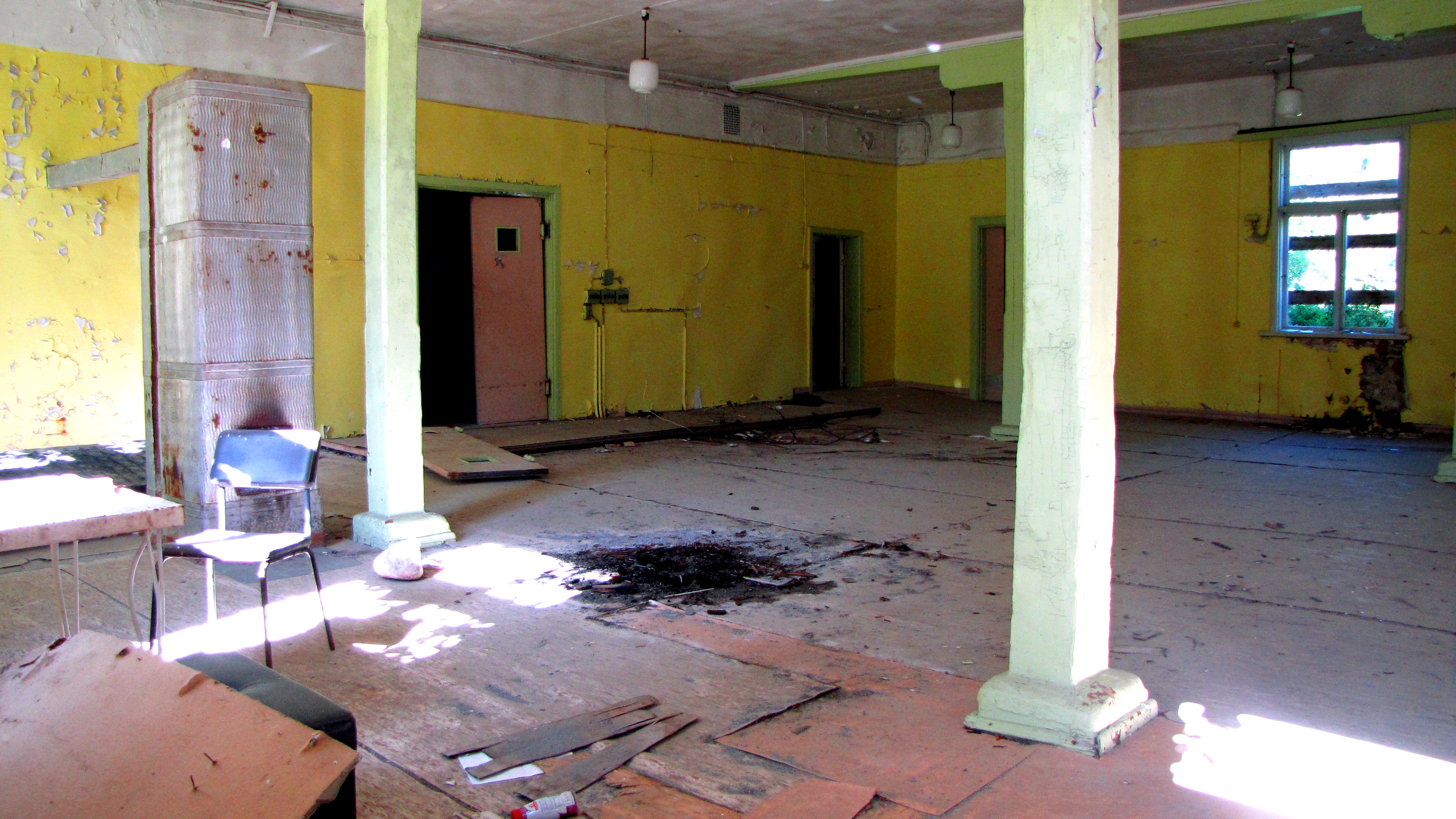 Aegna garnisoni söökla, 1914, 1930.